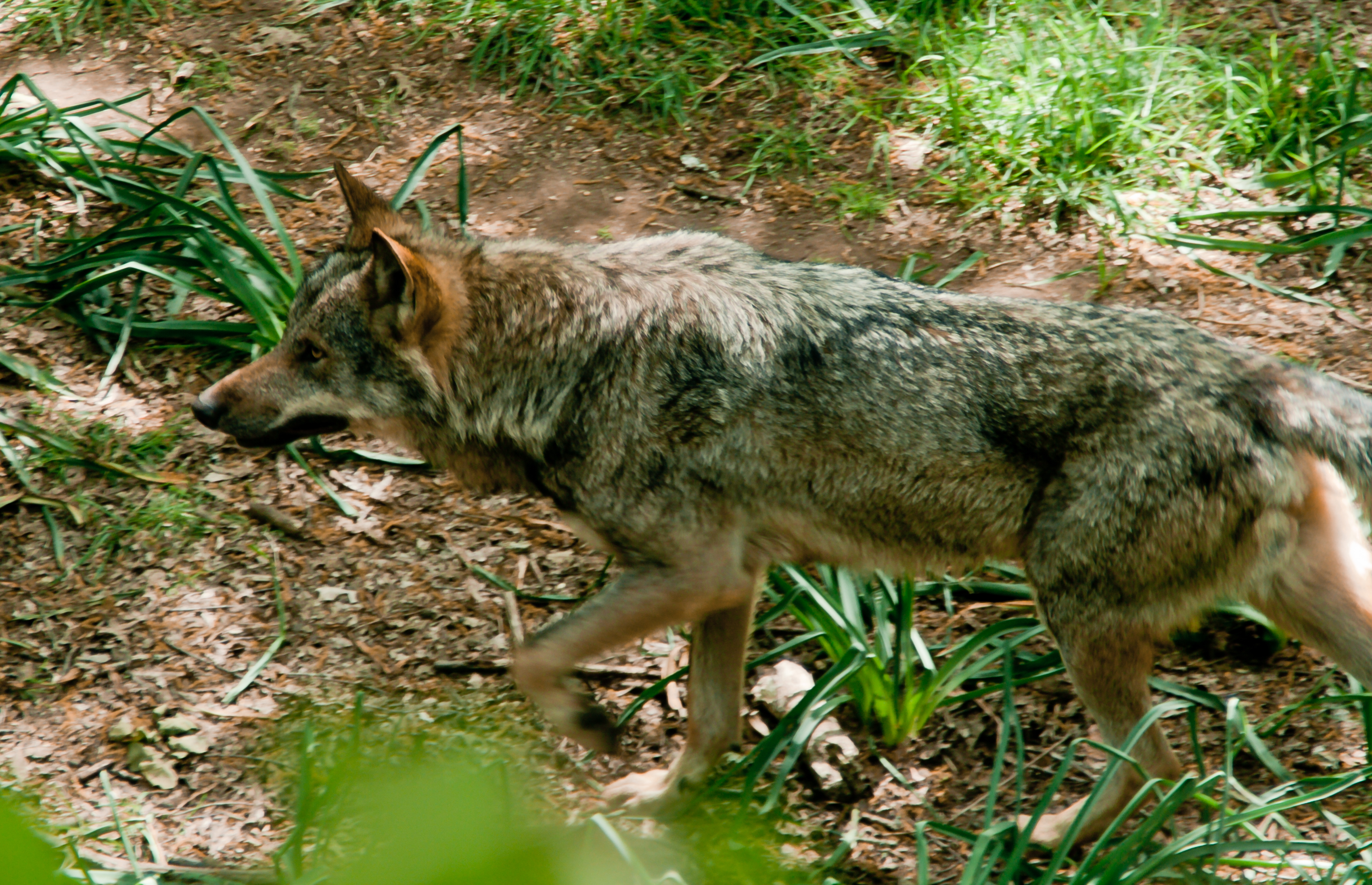 Un dos lobos que se pode ver en Marcelle Natureza, en Outeiro de Rei.